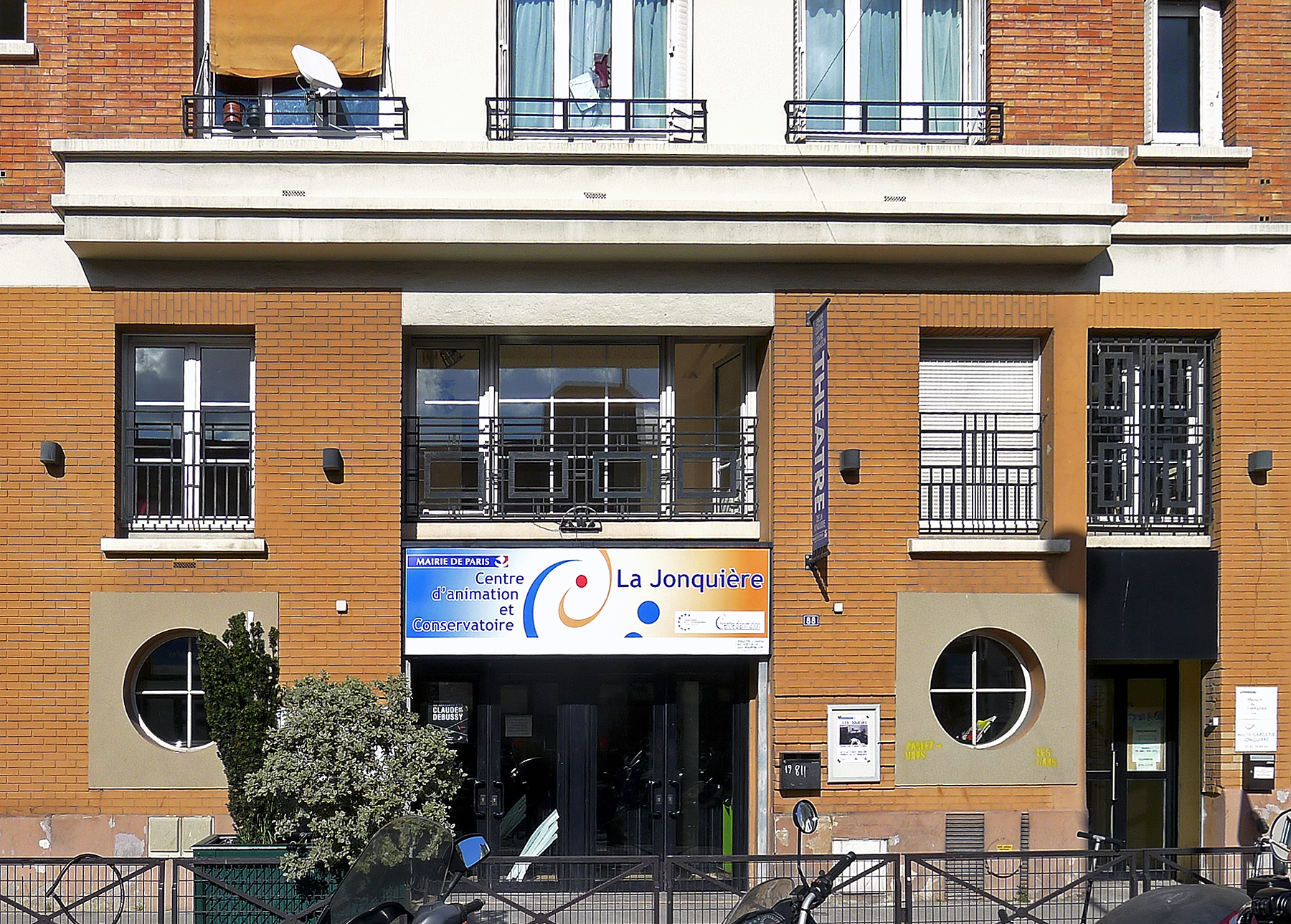 Rue de La Jonquière (théâtre Jonquière) - Paris XVII